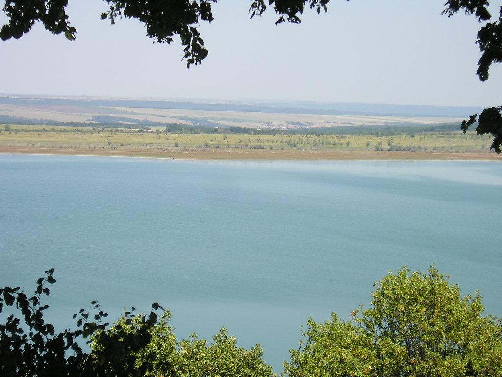 Rabisha Lake, Bulgaria